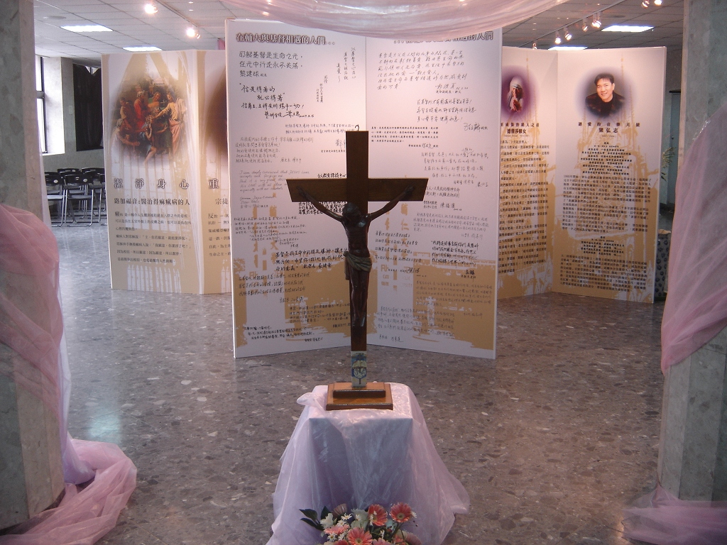 輔大宗教週展覽